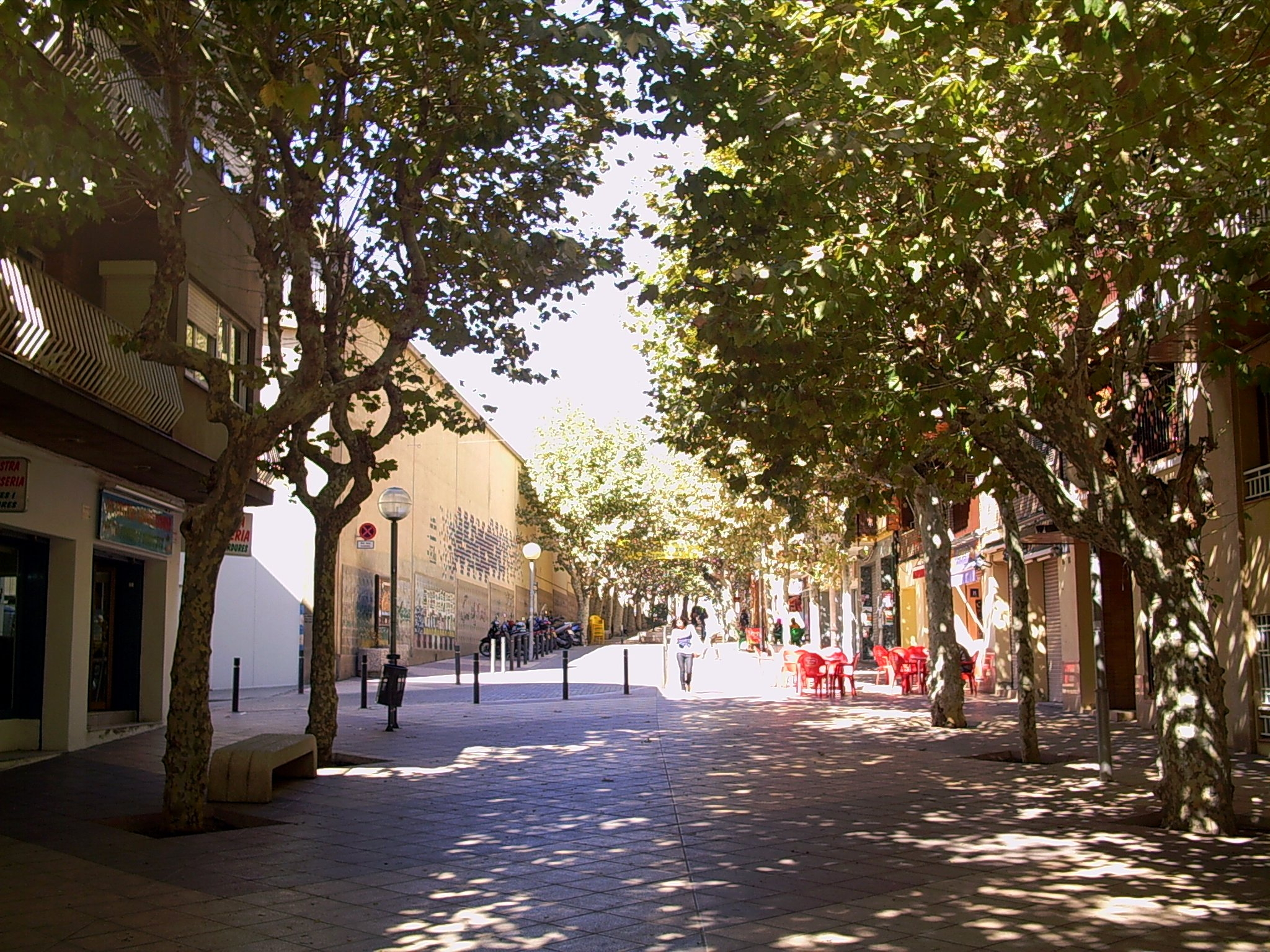 Riera de Premià, a Premià de Mar, comarca del Maresme, (Catalunya)